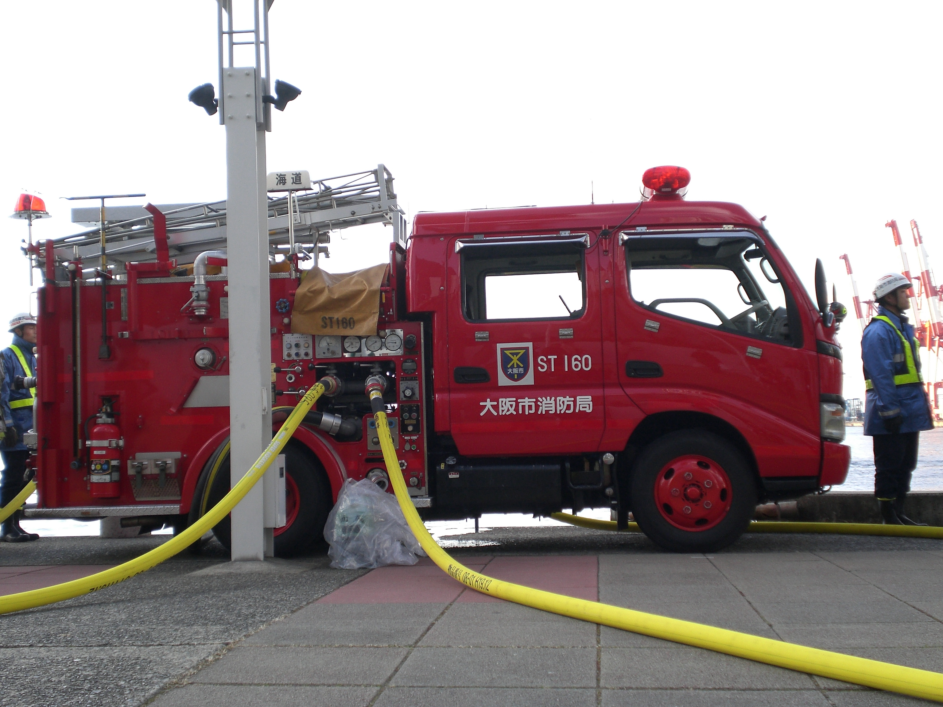 説明＝平成22年大阪市消防出初式にて撮影。